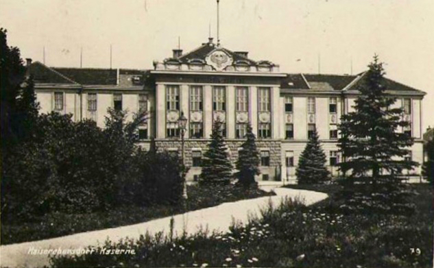 k.u.k. Kaserne in Kaiserbersdorf